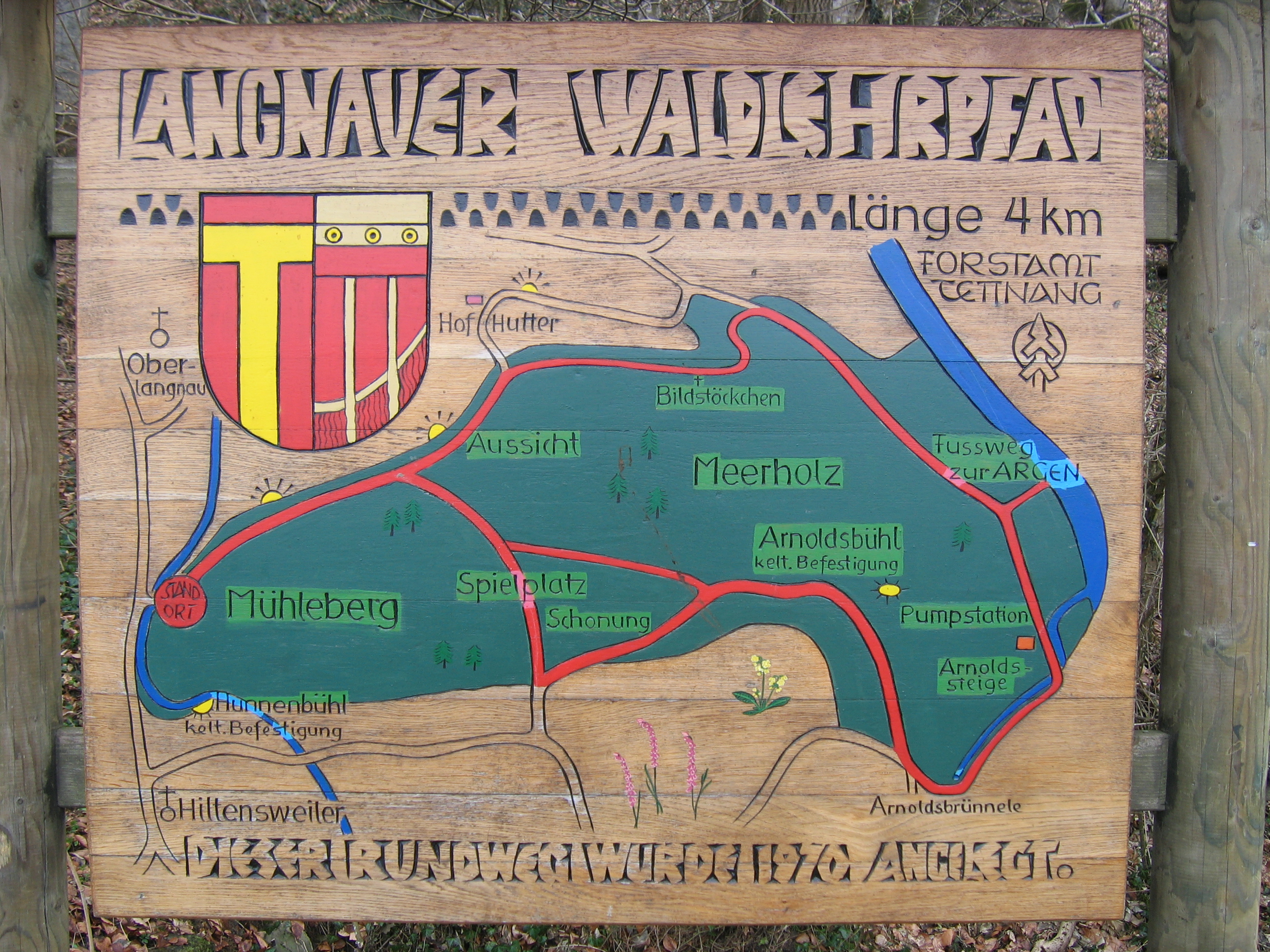 Deutschland - Baden-Württemberg - Bodenseekreis - Tettnang - Langnau: Infotafel am Langnauer Waldlehrpfad